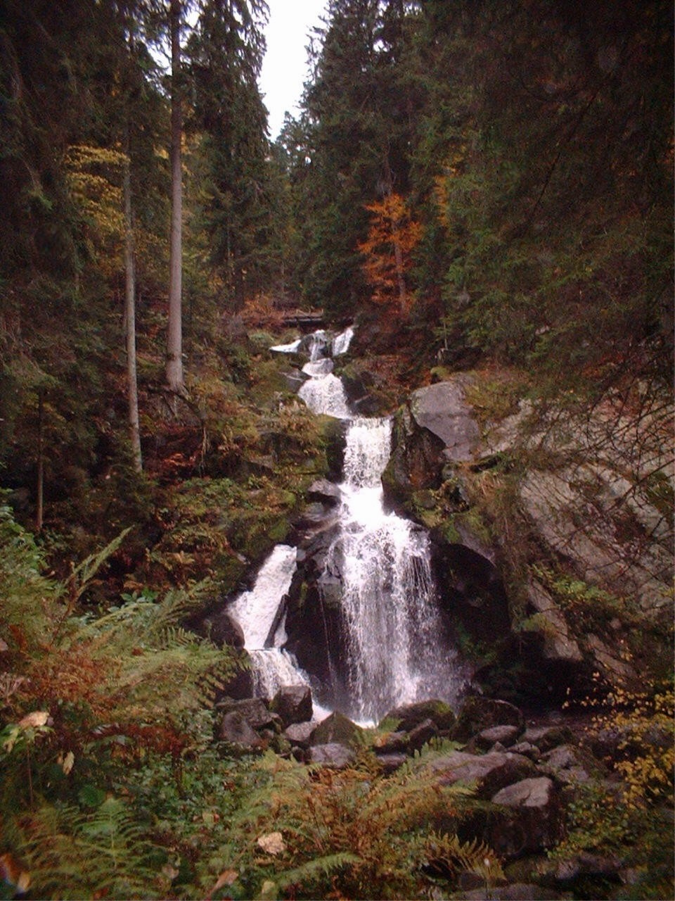 Triberger Wasserfall